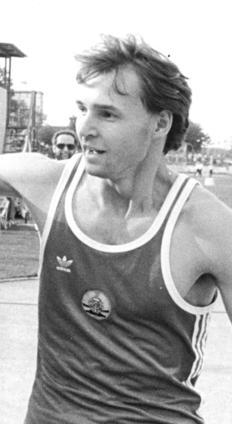 ADN-ZB Kluge 3.6.84 Erfurt: 35. DDR-Meisterschaften in der Leichtathletik - Europarekord - Eine 4x 400-m-Staffel der Männer mit Guido Lieske, Thomas Schönlebe, Jens Carlowitz und Mathias Schersing (vlnr) stellte in 3:00,07 Min einen neuen Europarekord auf.